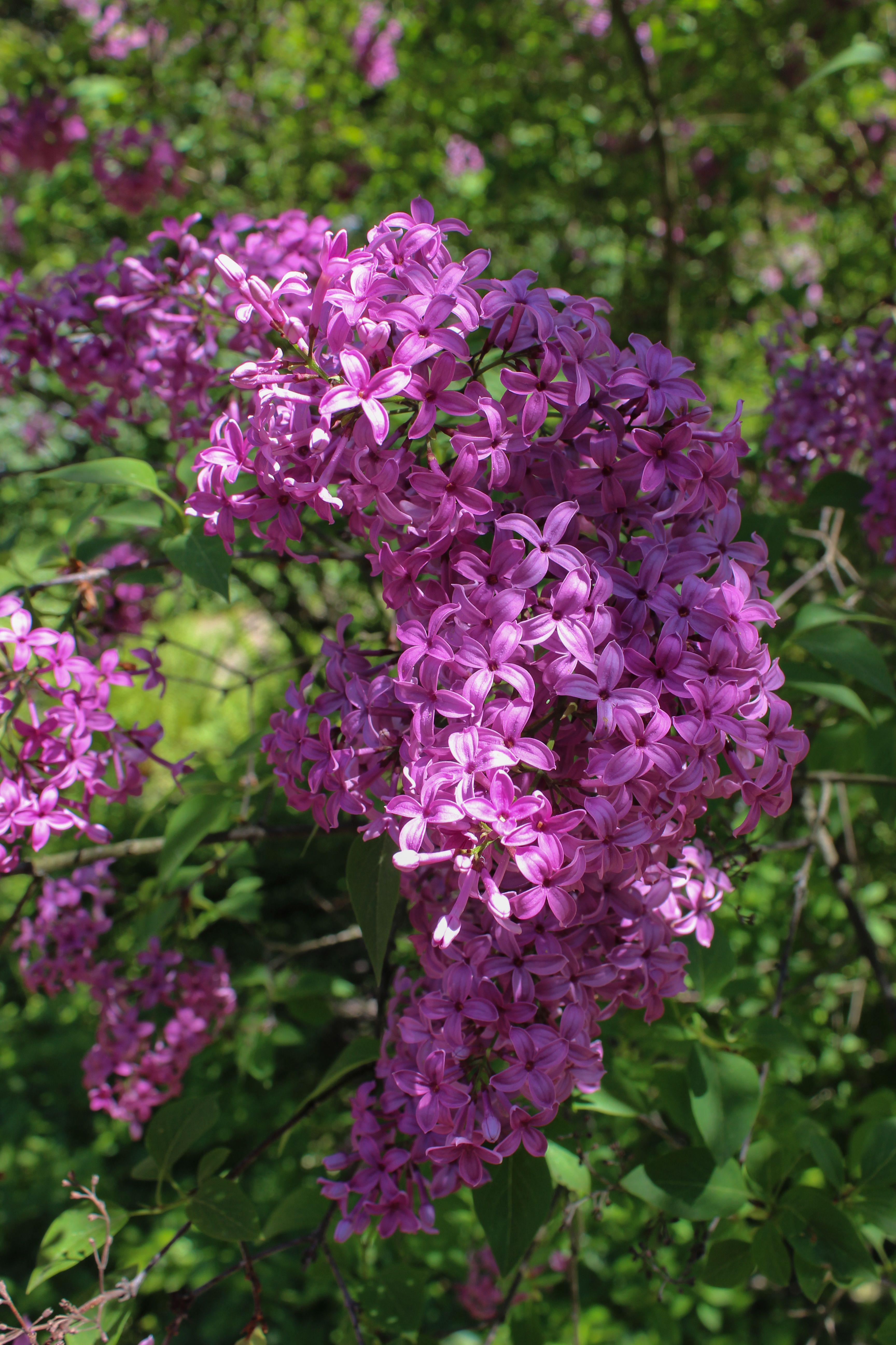 Сирецький дендропарк, Подільський район